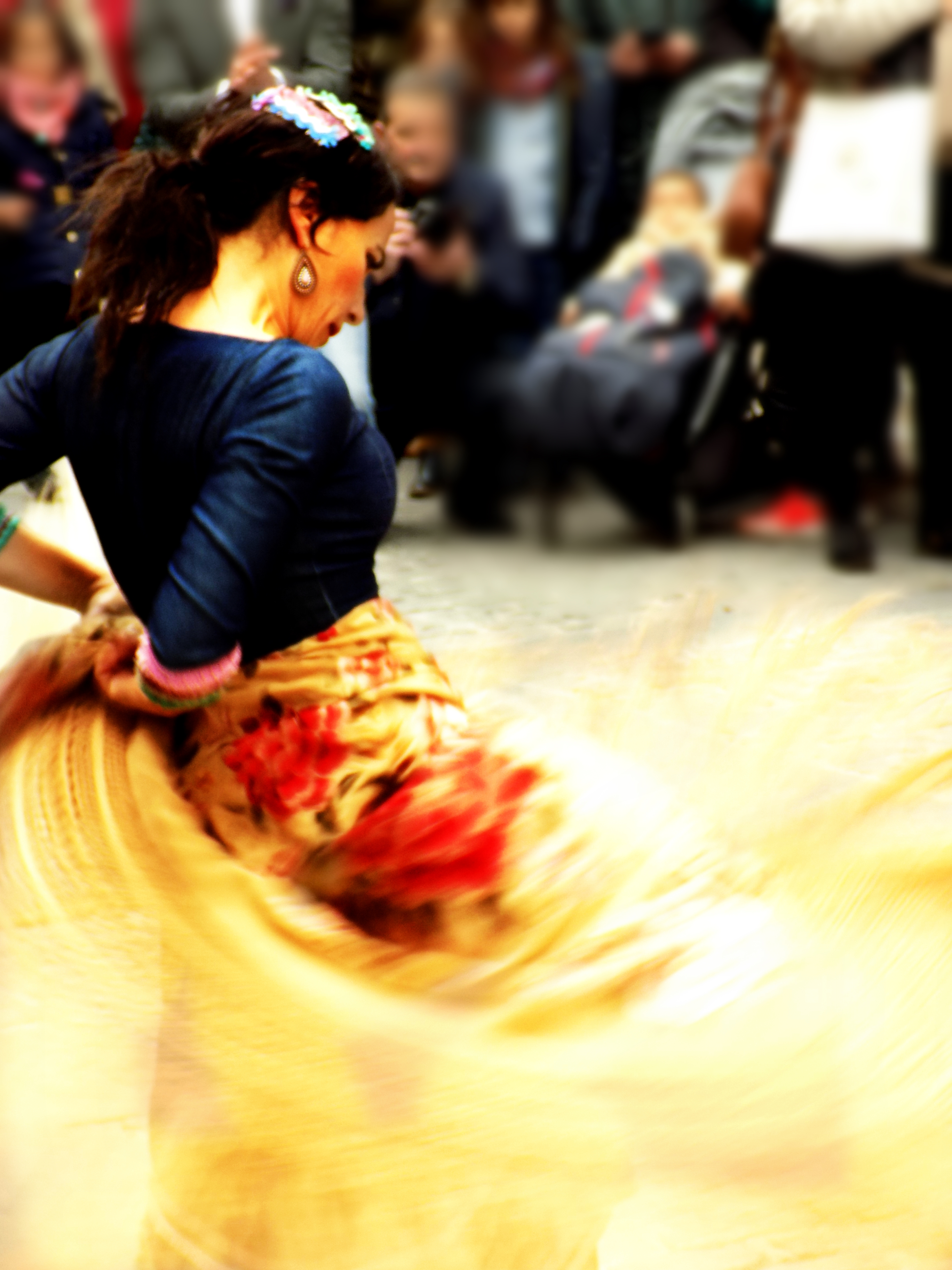 Baile con manton